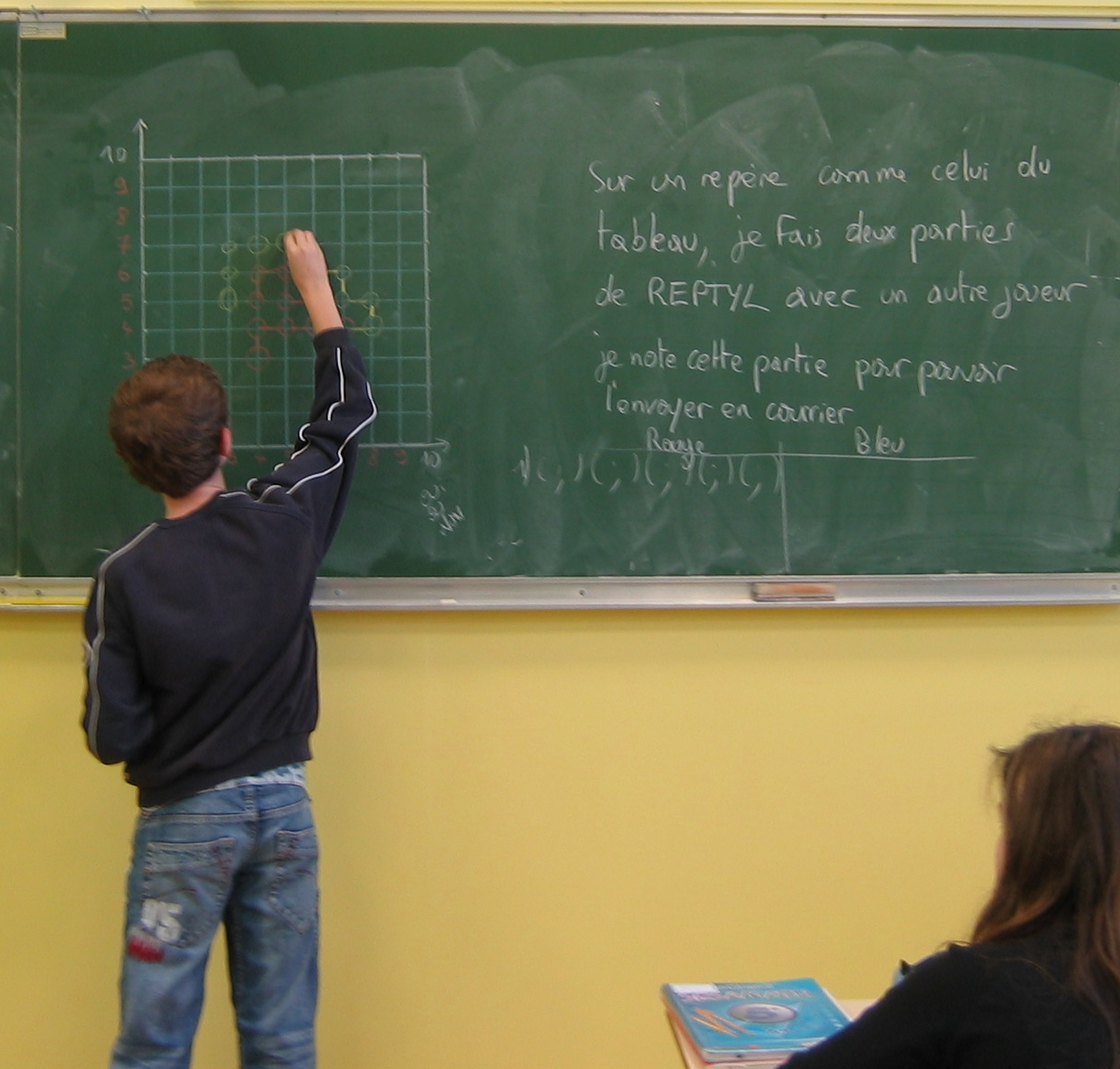 Partie de Reptyl en classe de mathématiques